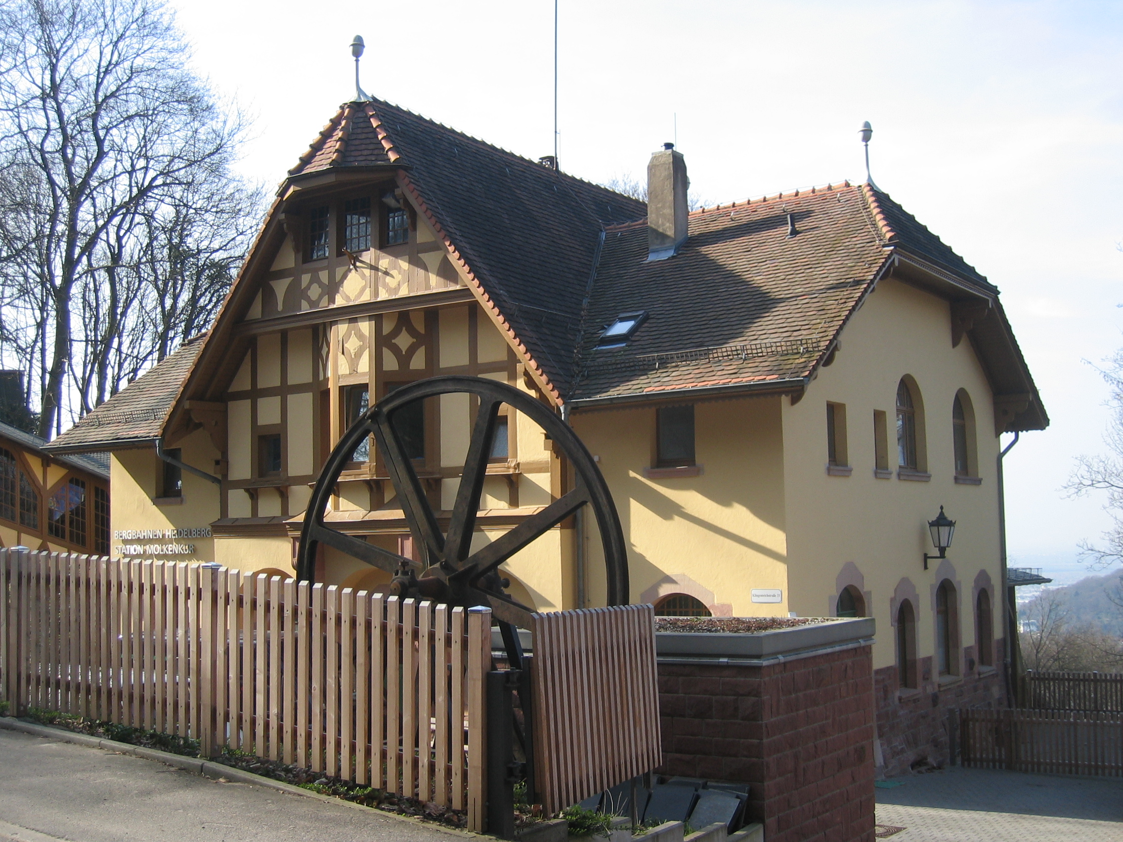 Molkenkur Station Heidelberg Deutschland